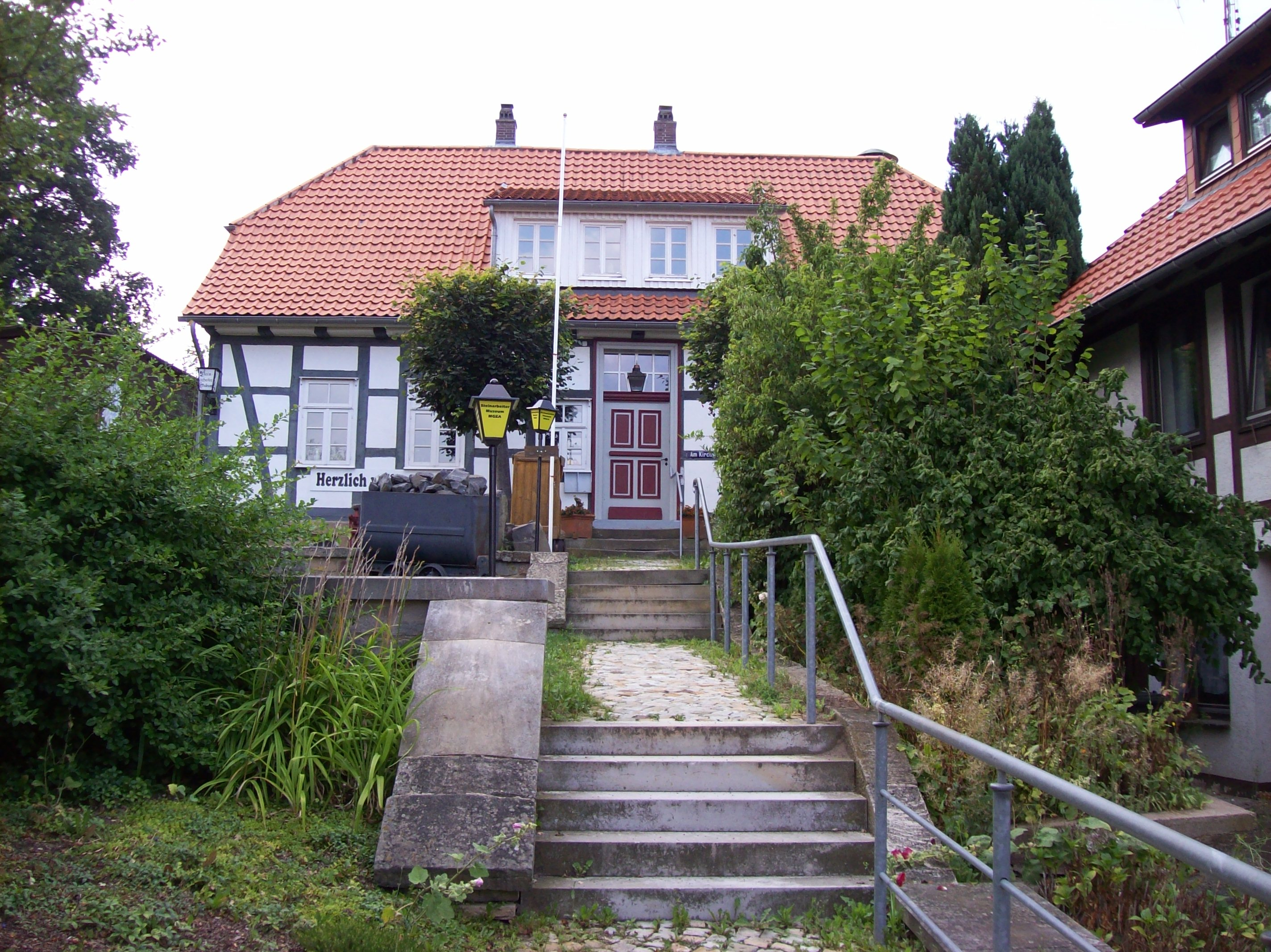 Das Steinmetzmuseum Adelebsen